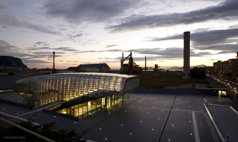 Centre thermal et culturel de Bagnoli